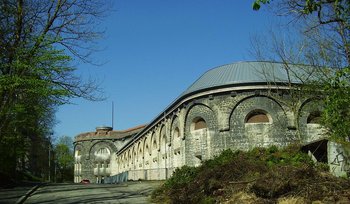 Die Wilhelmsburg in Ulm